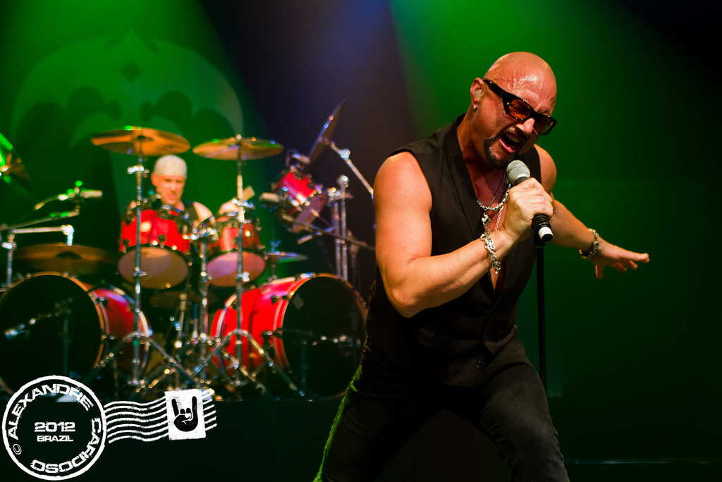 Queensrÿche ao vivo no HSBC Brasil - 14/04/2012 - São Paulo, Brasil